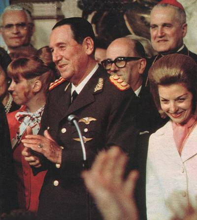 Juan Domingo Perón asume su tercera presidencia, a su derecha, su esposa, María Estela (Isabel) Martínez de Perón, quien asumió la vicepresidencia.